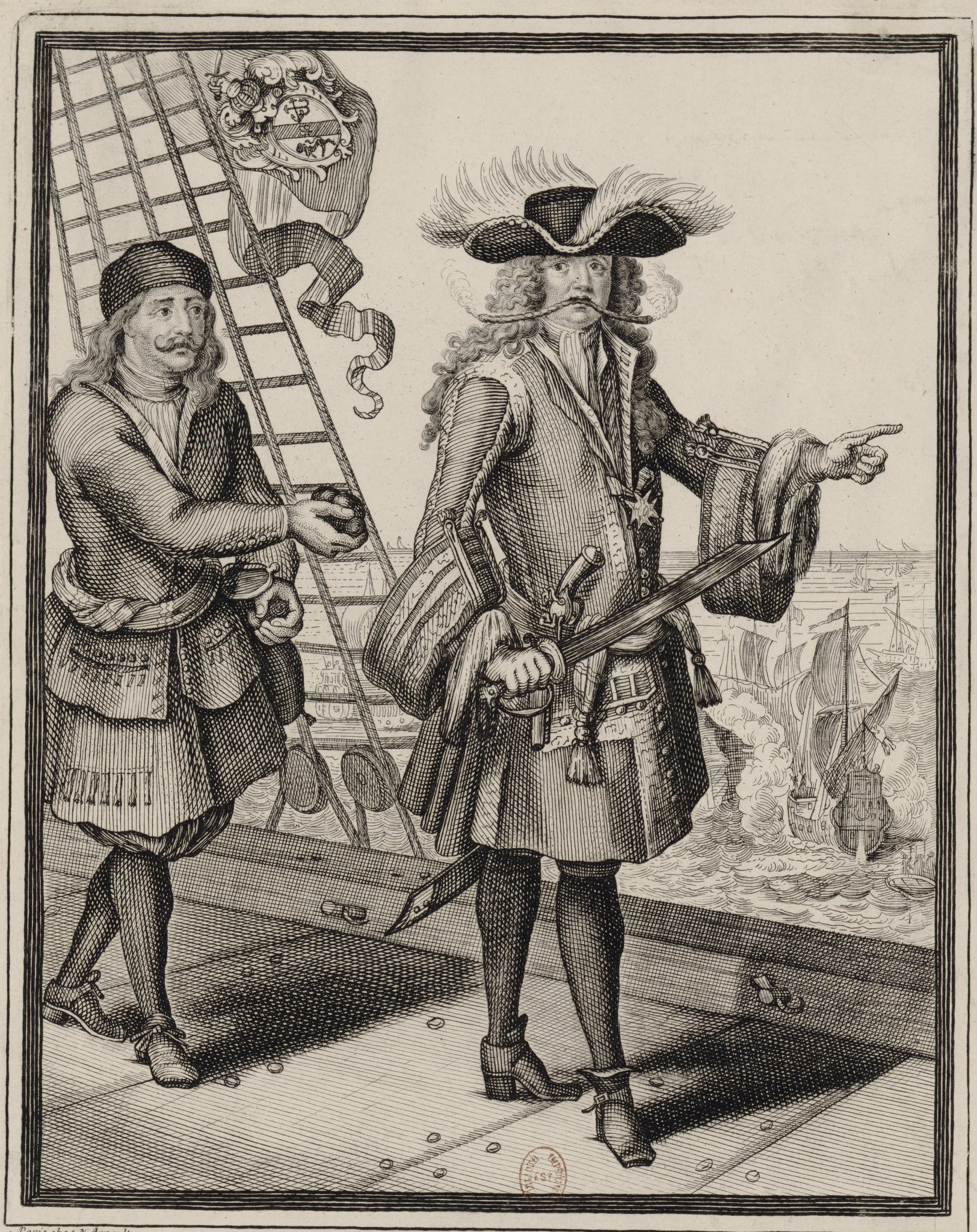 Portrait de Jean de Bart.